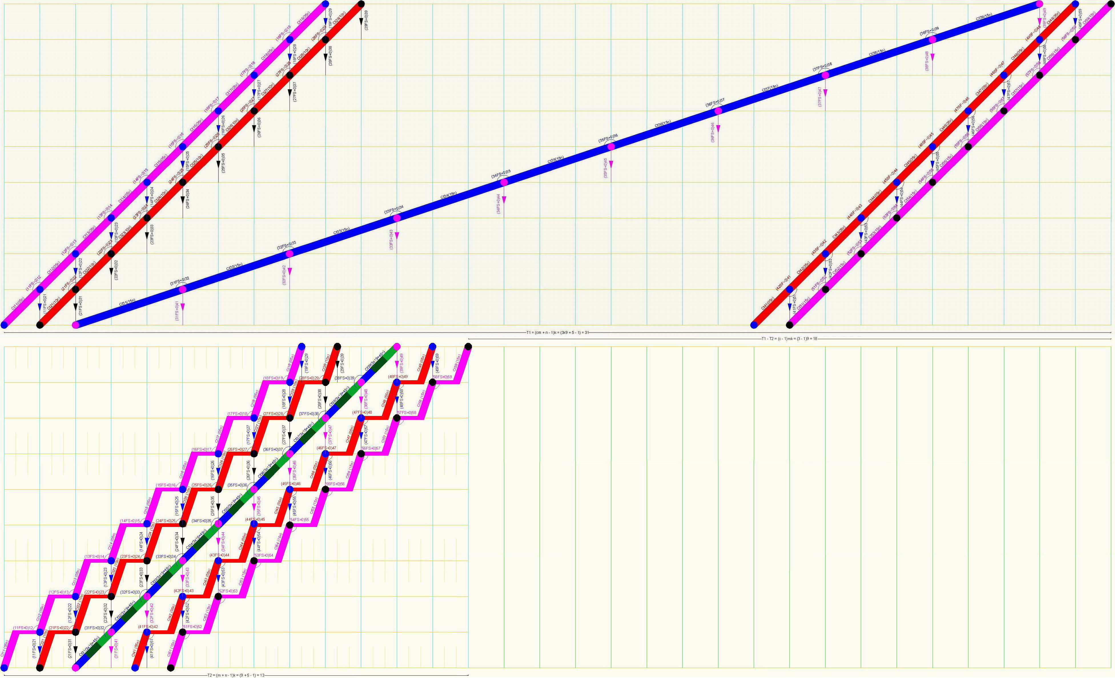 Hình vẽ mô tả việc biến đổi dây chuyền đơn nhịp bội số (còn gọi là cân bằng dây chuyền nhịp bội theo nhịp nhanh), trong tiến độ dây chuyền nhịp bội (nhịp nhanh), thành nhiều dây chuyền đơn cùng chuyên môn. Nhằm làm giảm tối đa thời lượng thực hiện toàn bộ dự án. Hình hoàn toàn do tôi sáng tạo ra, qua việc vẽ trên AutoCAD 2010, chụp ảnh màn hình, và sửa đổi trên ACD FotoCanvas 3.0 cùng Paint.